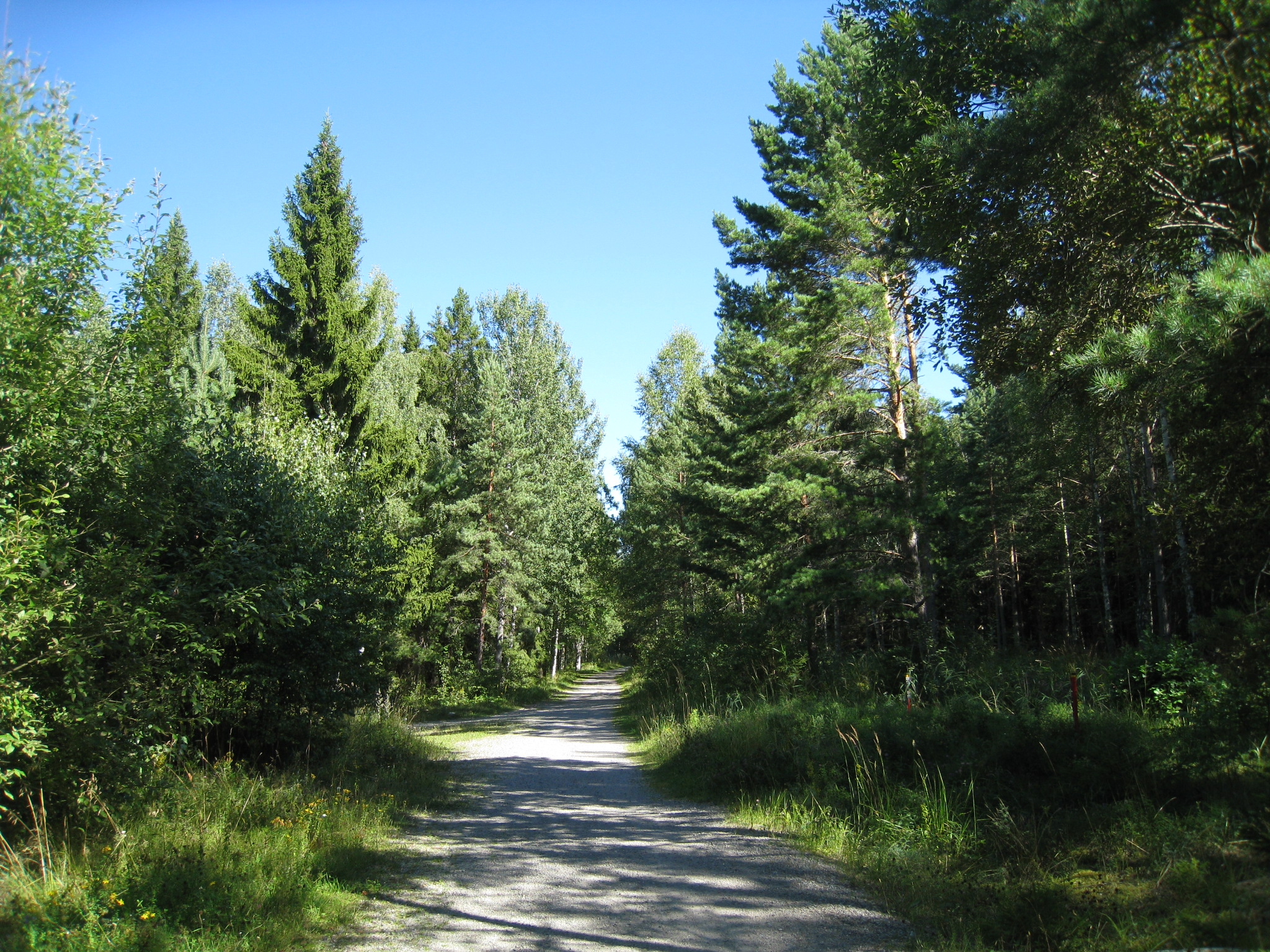 Bilden visar promenadvägen i Görvälns naturreservat där Viksjö såg låg. "Här låg Viksjö såg" åren 1963-1980 i Sandvik, Viksjö, Järfälla kommun. I terrängen finns fortfarande husgrunder kvar som visar var byggnaderna en gång låg.